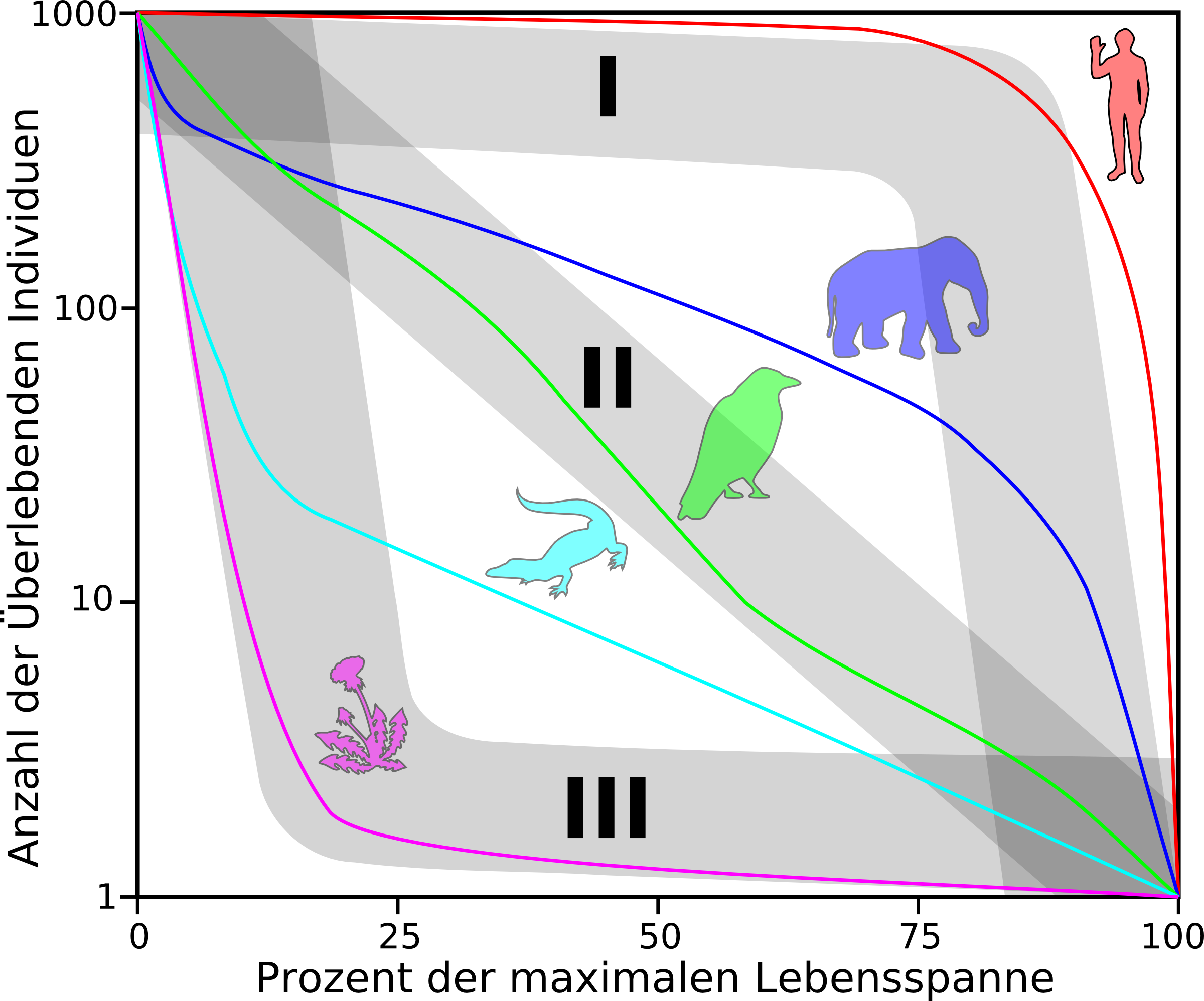 Die Überlebenskurven der für fünf verschiedene Lebewesen (Mensch, Elefant, Krähe, Eidechse und Löwenzahn). Inspiration und Daten (teilweise) von [1].